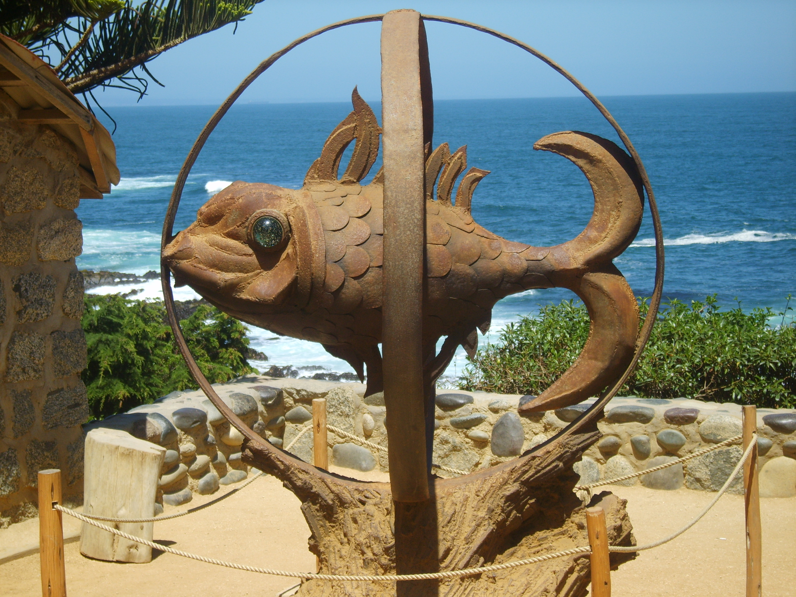 Pez de la Casa de Isla Negra, pertenenciente a Pablo Neruda. This is a photo of a national monument in Chile: 783